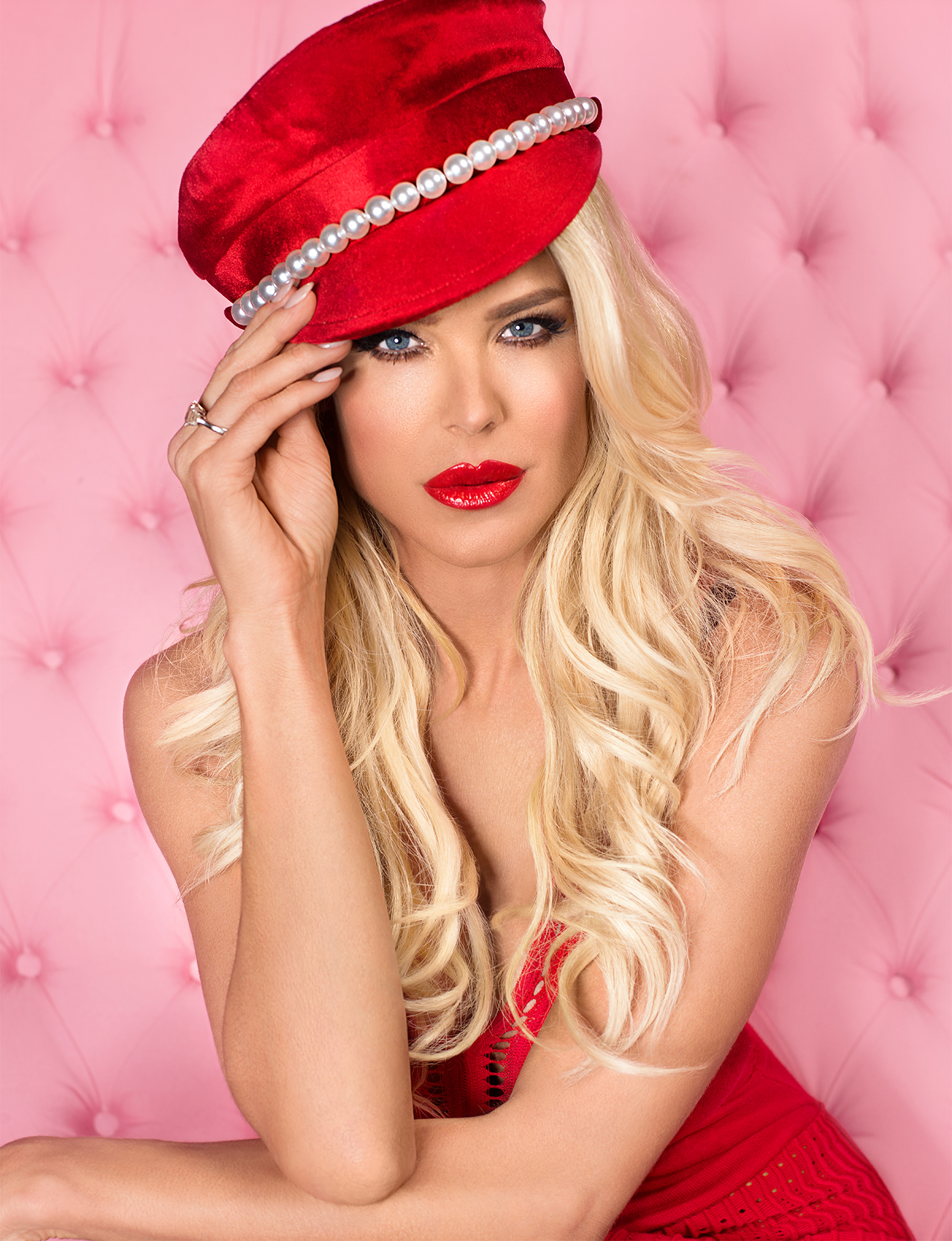 Victoria Silvstedt à Monaco photographiée par Gil Zetbase